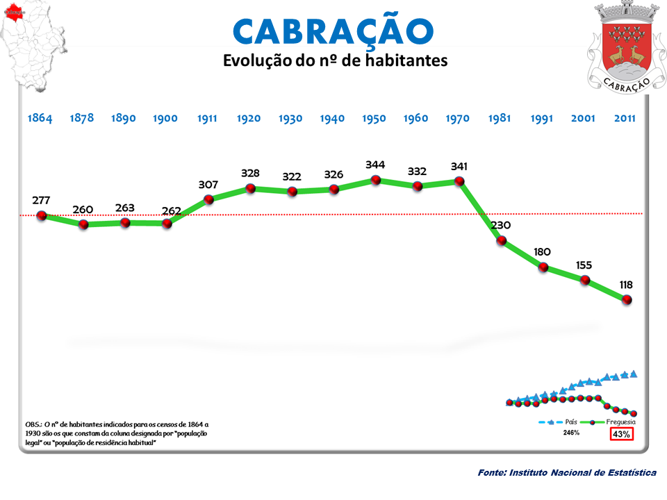 Censos 1864/2011